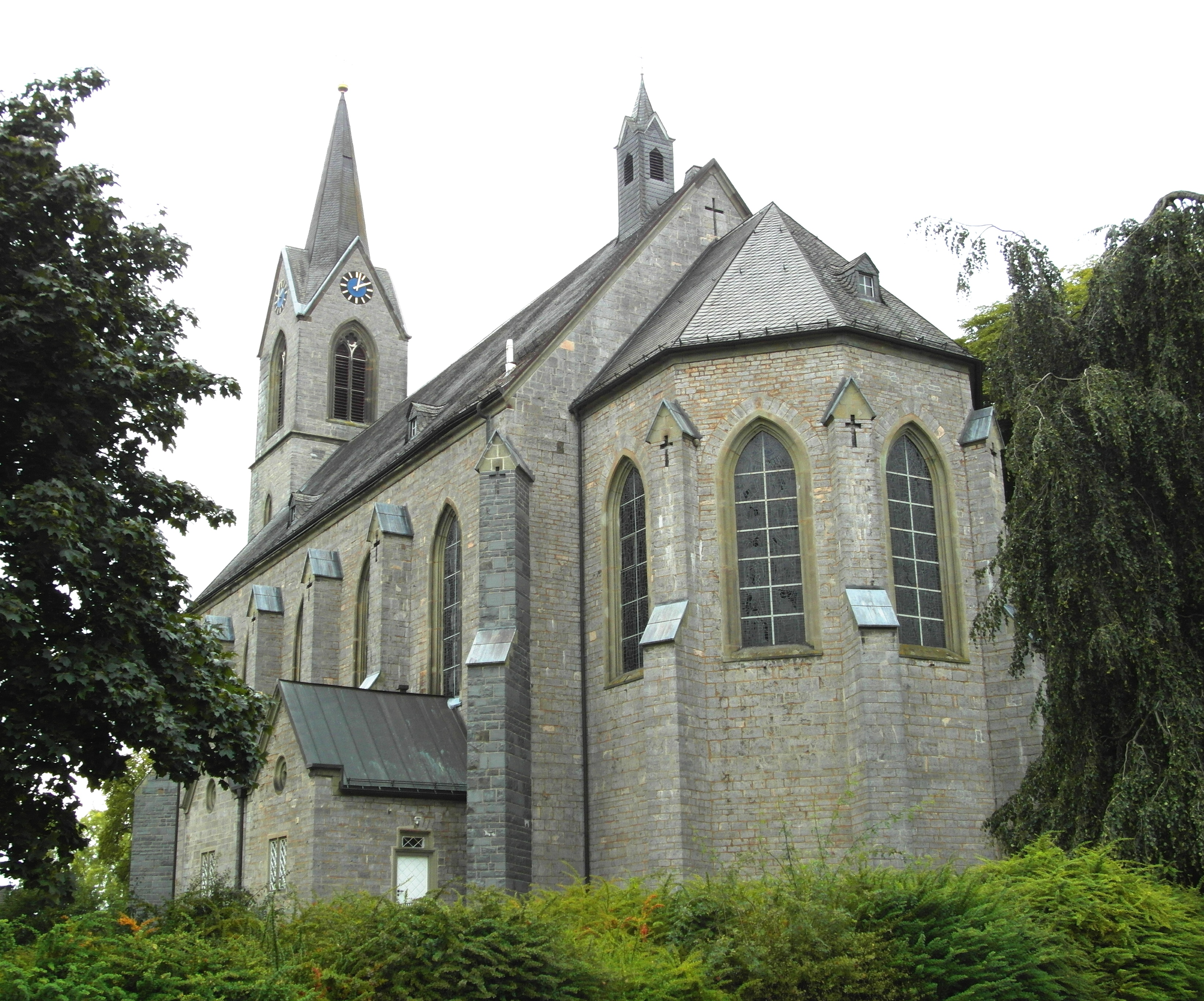 Pfarrkirche in Eslohe-Reistre an der Bundesstraße 55